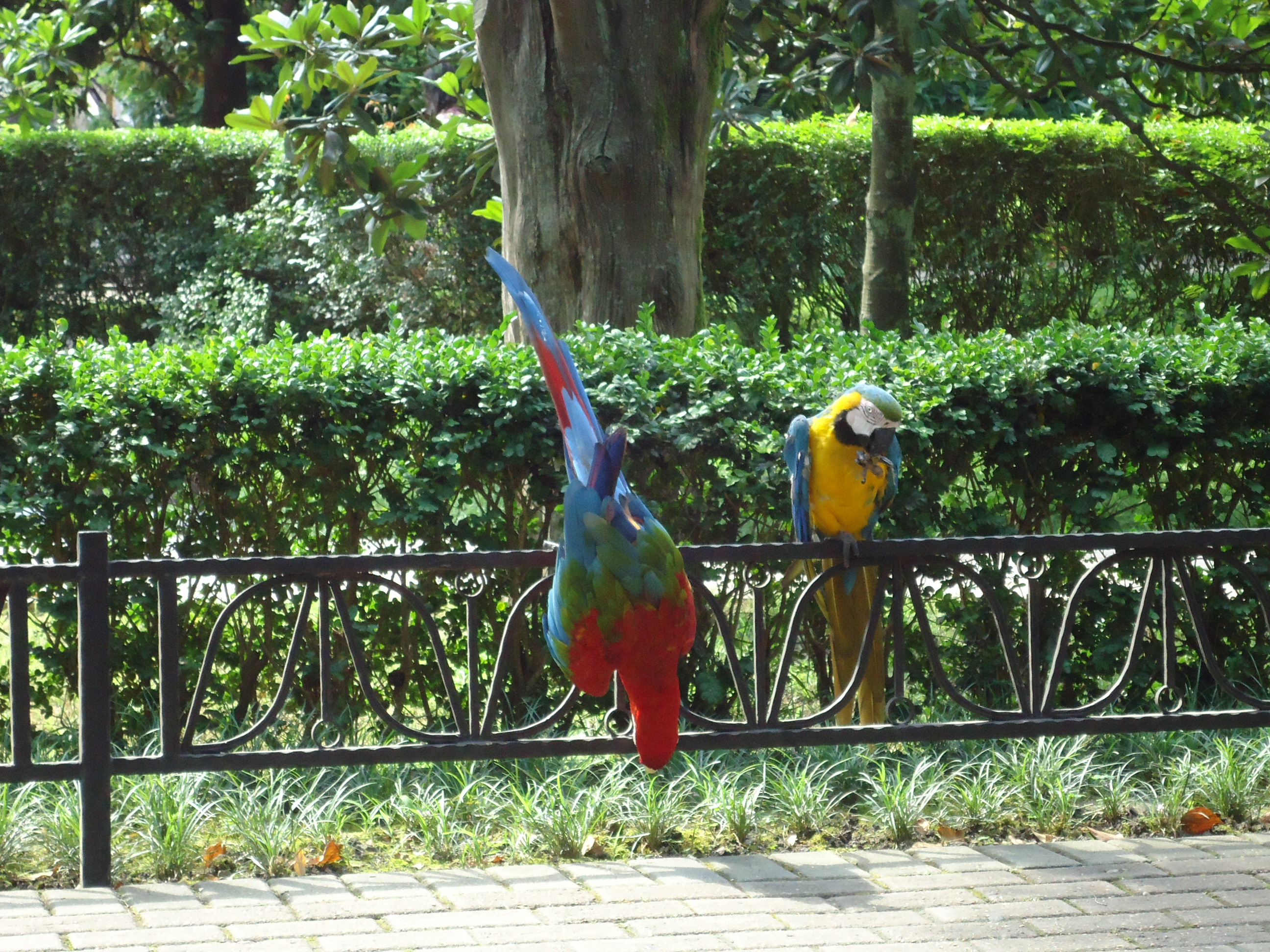 Ручные попугаи - завсегдатели парка Ривьера